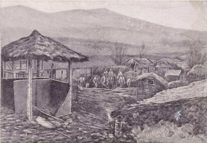 Возарци през Първата световна война